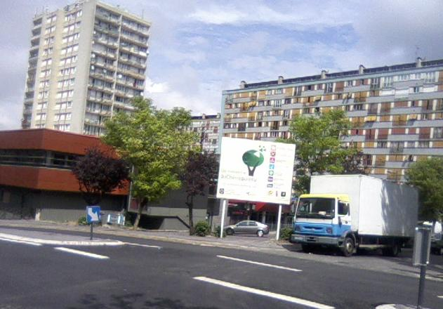 Vue d'immeubles à la cité du Chêne Pointu, Clichy-sous-Bois / Seine-Saint-Denis.